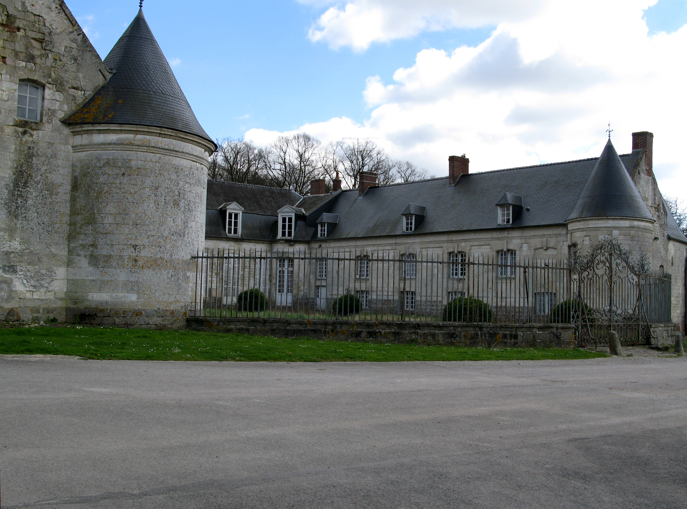 Vadencourt (Somme, France) - Le château.